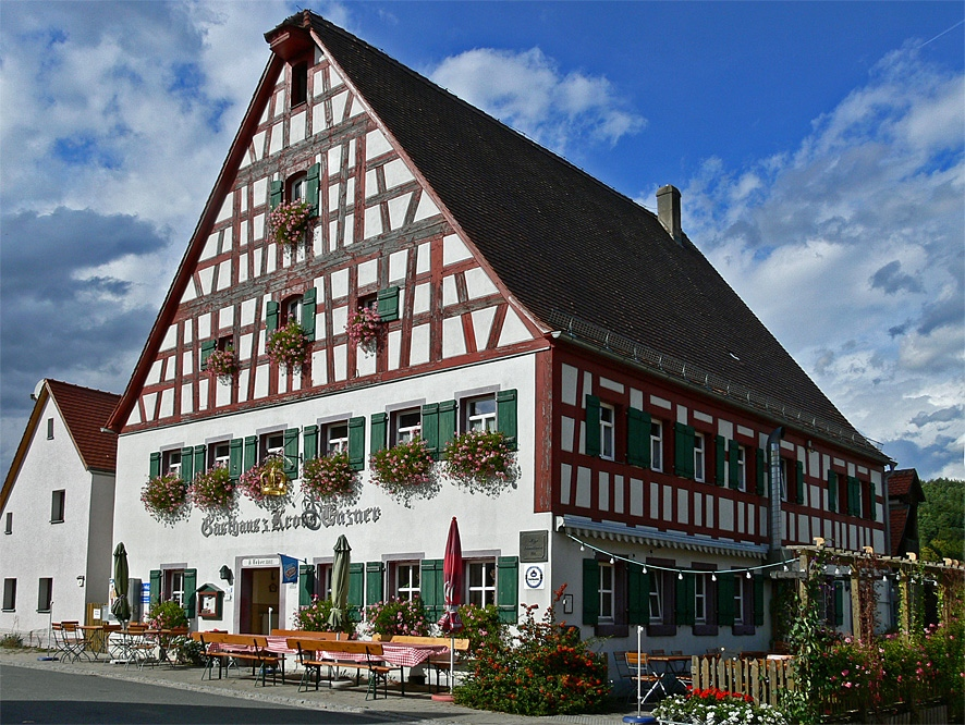 Unternbibert, Gemeinde Rügland, BayernHauptstraße 26, Gasthaus zur Krone, 17. JahrhundertThis is a photograph of an architectural monument.